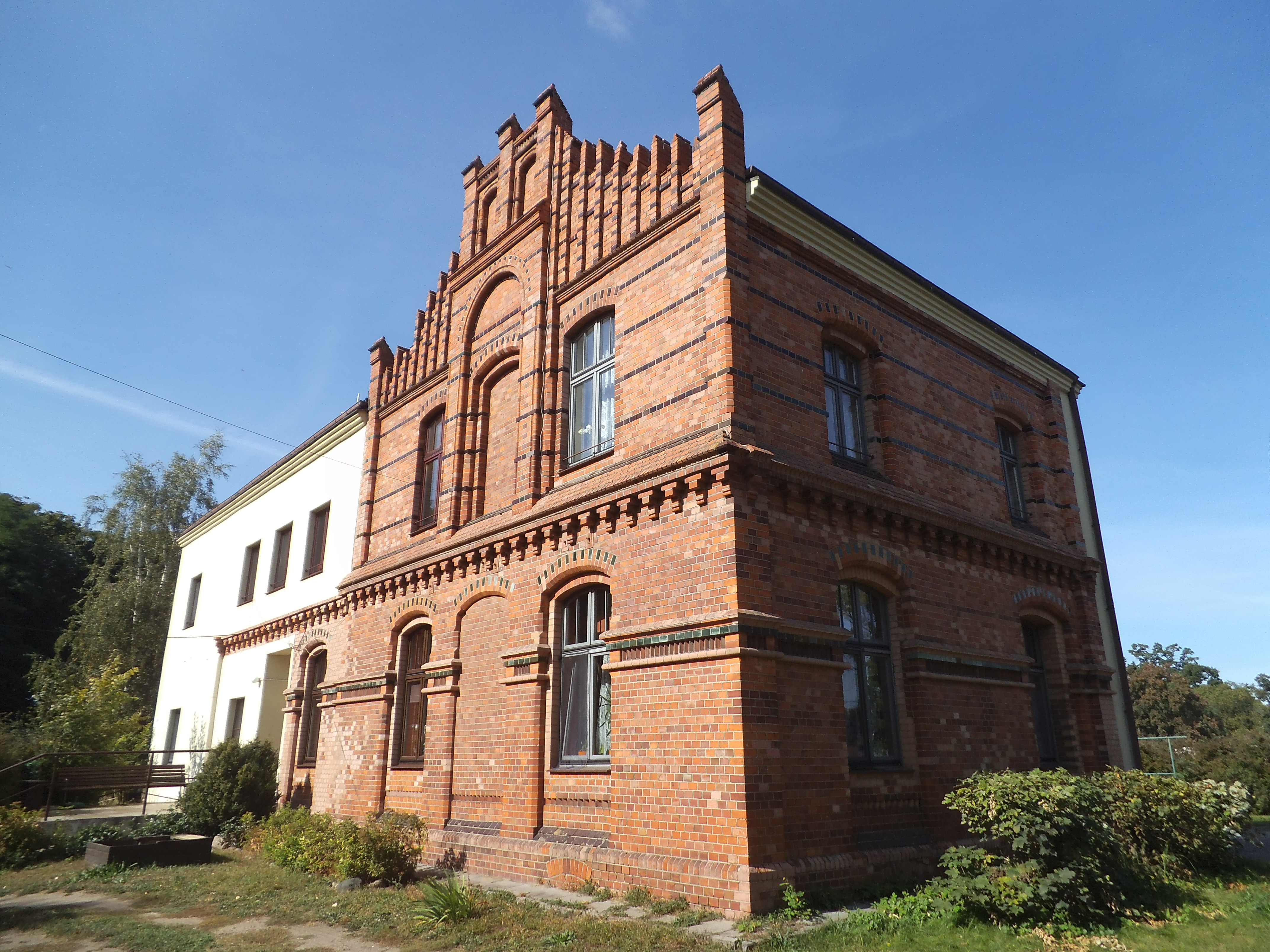 Dwór z XVIII wieku (folwark biskupów włocławskich) w Toruniu